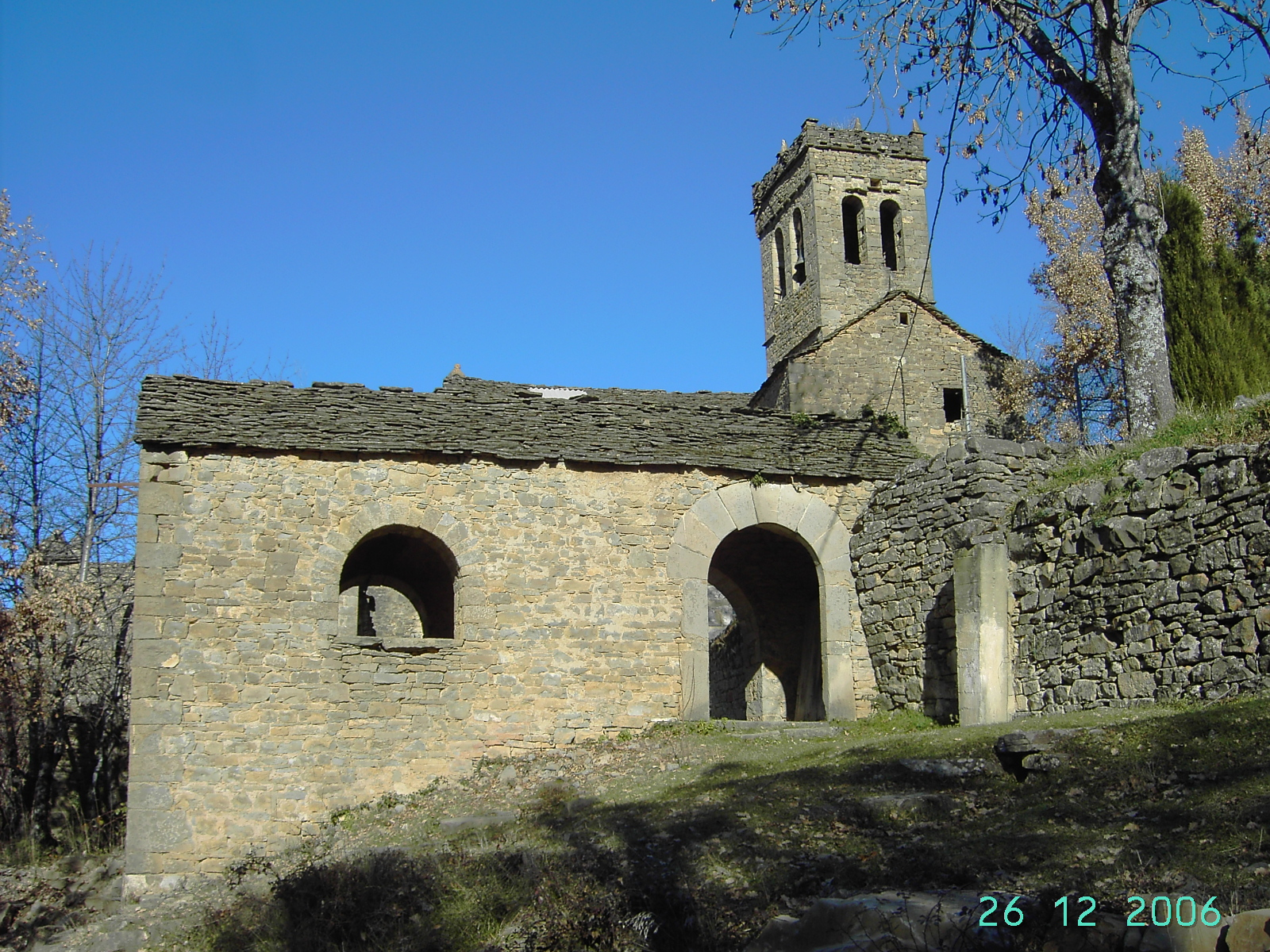 El esconjuradero de la iglesia de Asín de Broto, en la boca del Valle de Broto. Un ejemplo único de este tipo de construcciones esotéricas del Pirineo, que destaca por su planta rectangular, en lugar de la habitual planta cuadrada de esta clase de templetes.